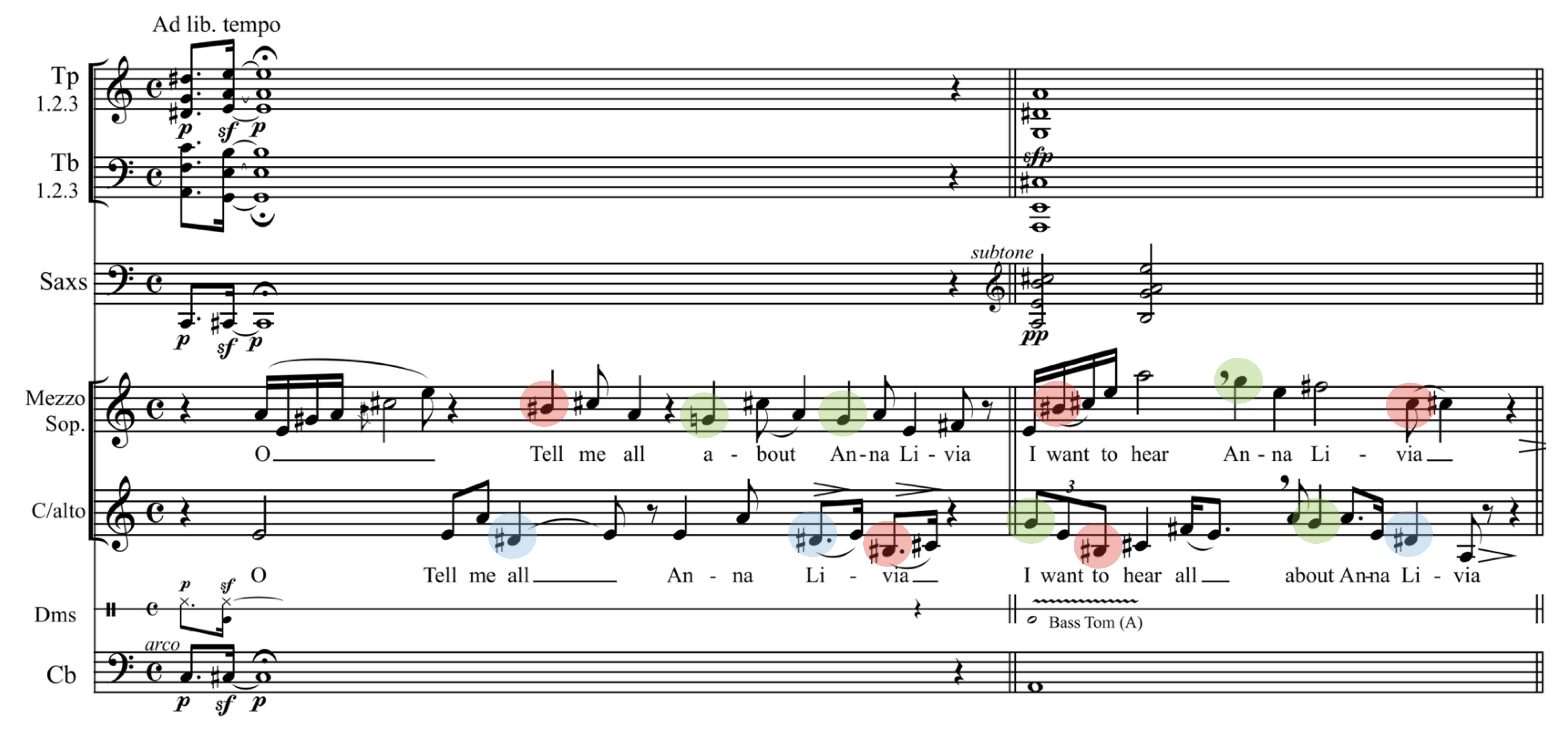 Extrait de l'introduction d'Anna Livia Plurabelle d'André Hodeir